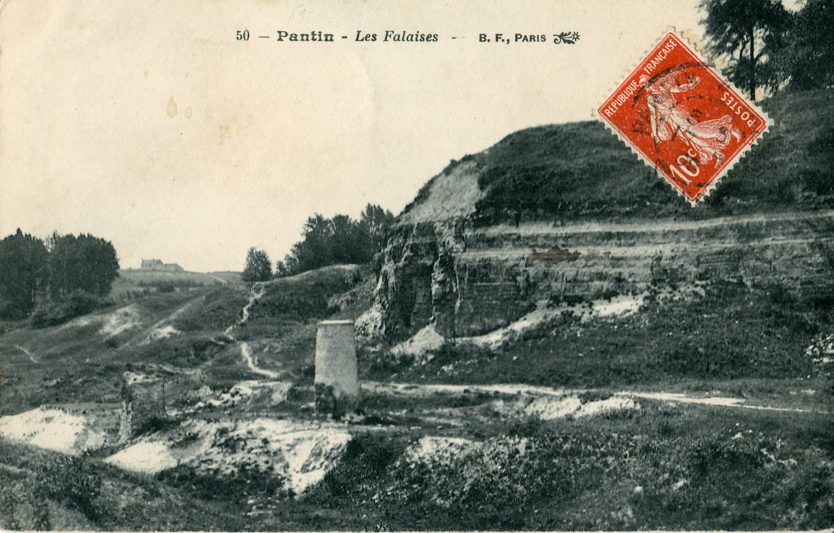 carte posatle ancienne éditée par BF N°50PANTIN : Les falaisesCes falaises, autrefois exploitées pour leur gypse, sont réaménagées par le Conseil général dans le cadre du projet de base de loisirs dite de la Corniche des Forts